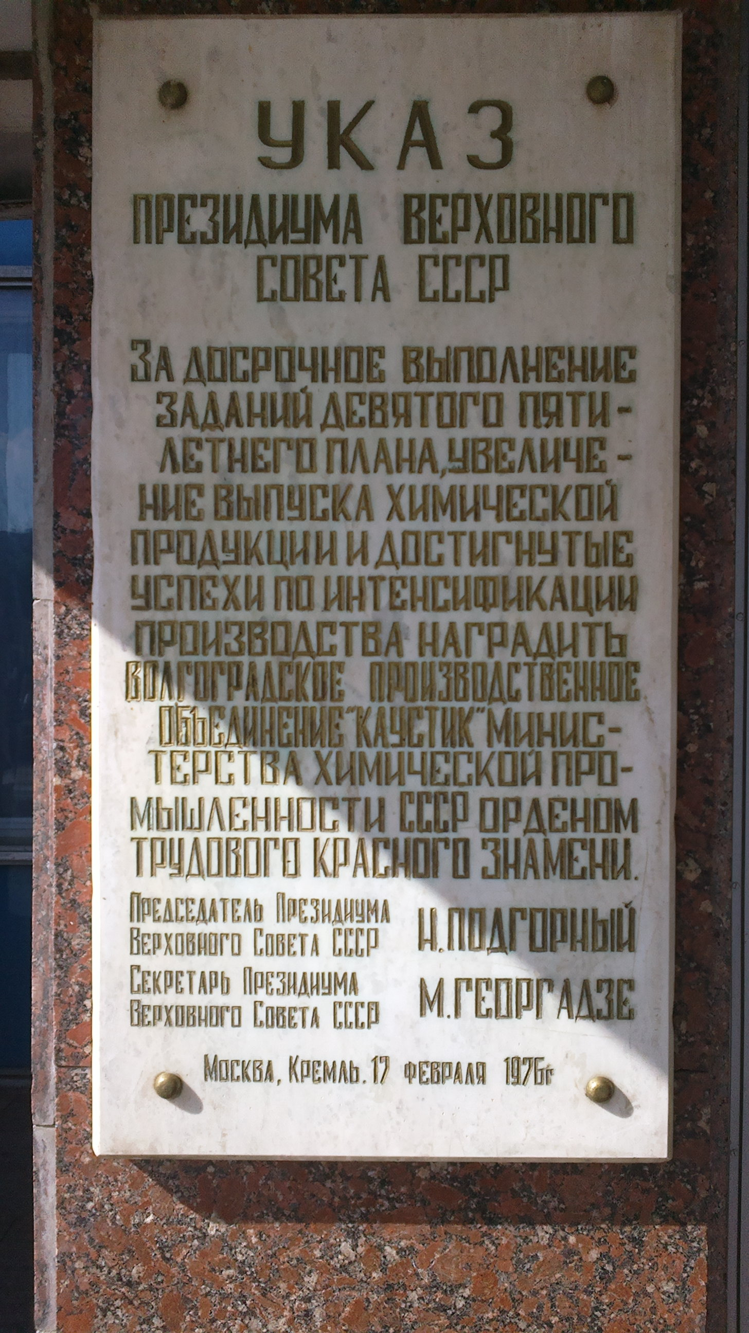 Памятная доска на здании ДК «Химик» в Волгограде